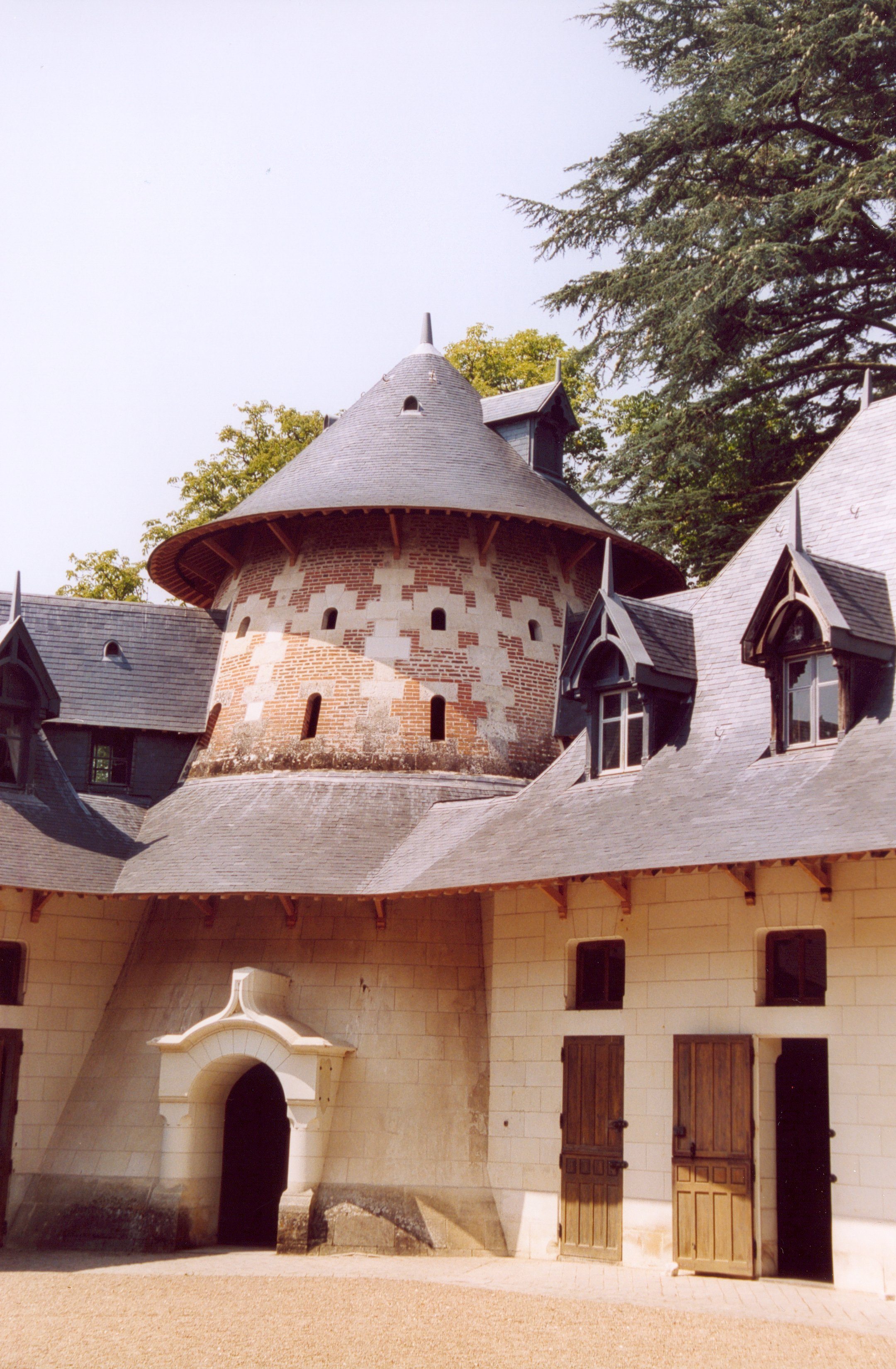 France Loir-et-Cher Chaumont-sur-Loire Ecuries Photographie prise par GIRAUD Patrick